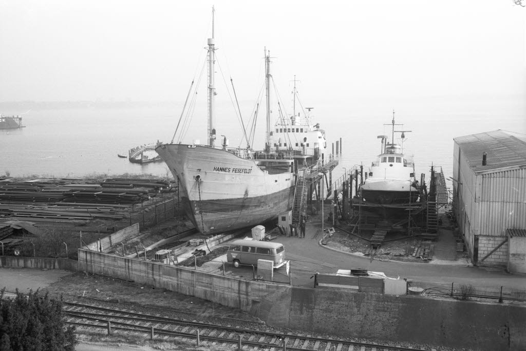 Neue Slipanlage kann Schiffe bis zu 60 Meter Länge und 900 Tonnen Tragfähigkeit aufnehmen. In der Bildmitte Küstenmotorschiff HANNES FESEFELDT aufgeslippt.